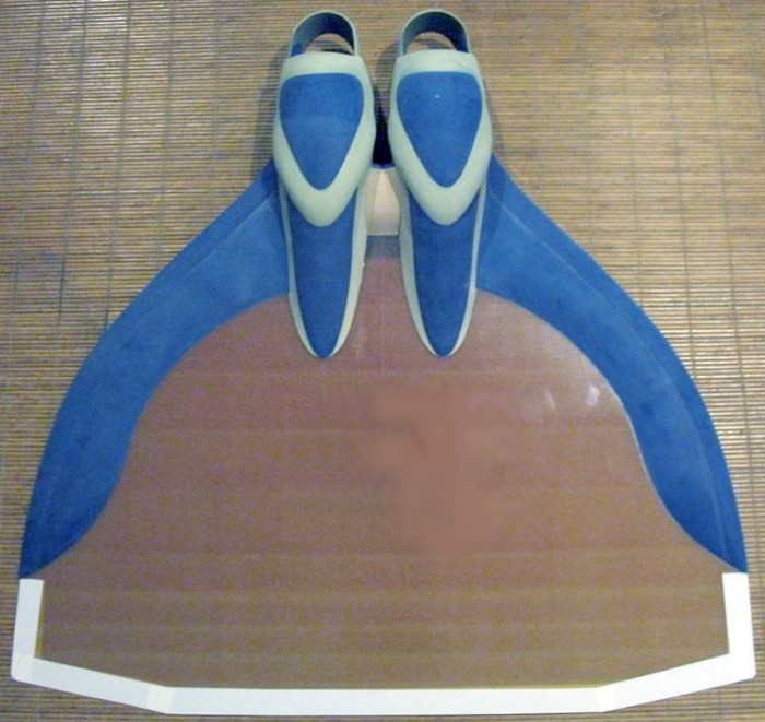 Monopalme à ailette